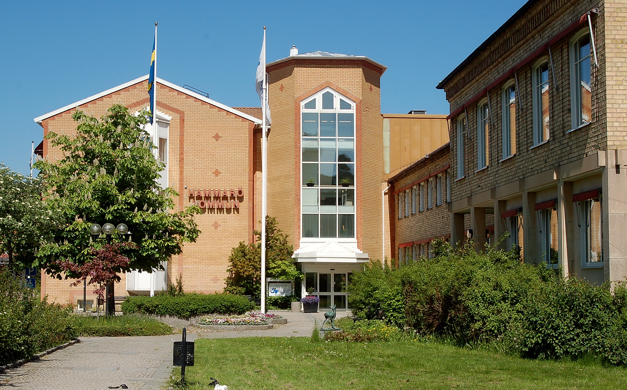 Hammarö kommunhus i Skoghall, Sverige. Hammarö City hall Skoghall, Sweden